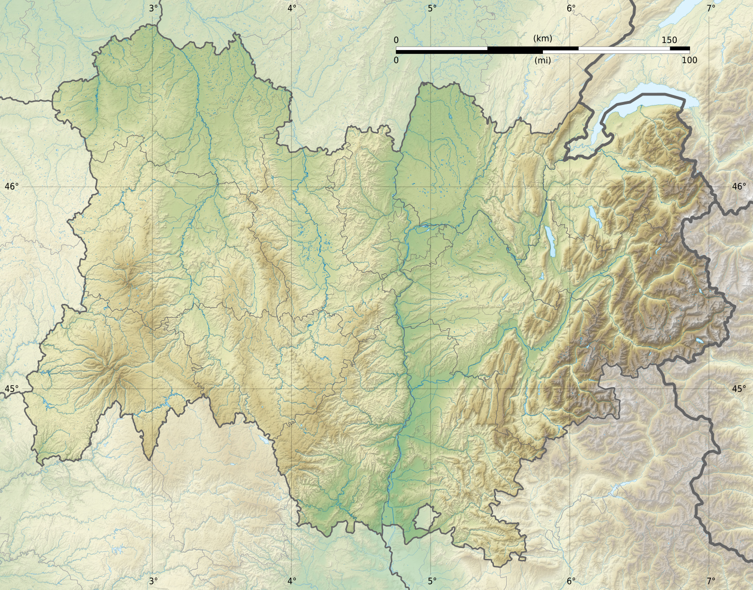 Carte topographique vierge de la région Auvergne-Rhône-Alpes, France, destinée à la géolocalisation. Projection "Géoportail" (projection équirectangulaire à la latitude de référence 46.5° Nord) Limites géogrpahiques de la carte : West: 1.908 E East: 7.320 E North: 46.925 N South: 44.005 N